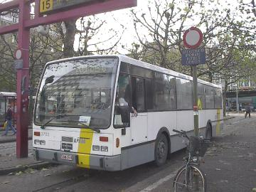 Streekbus "De Lijn"